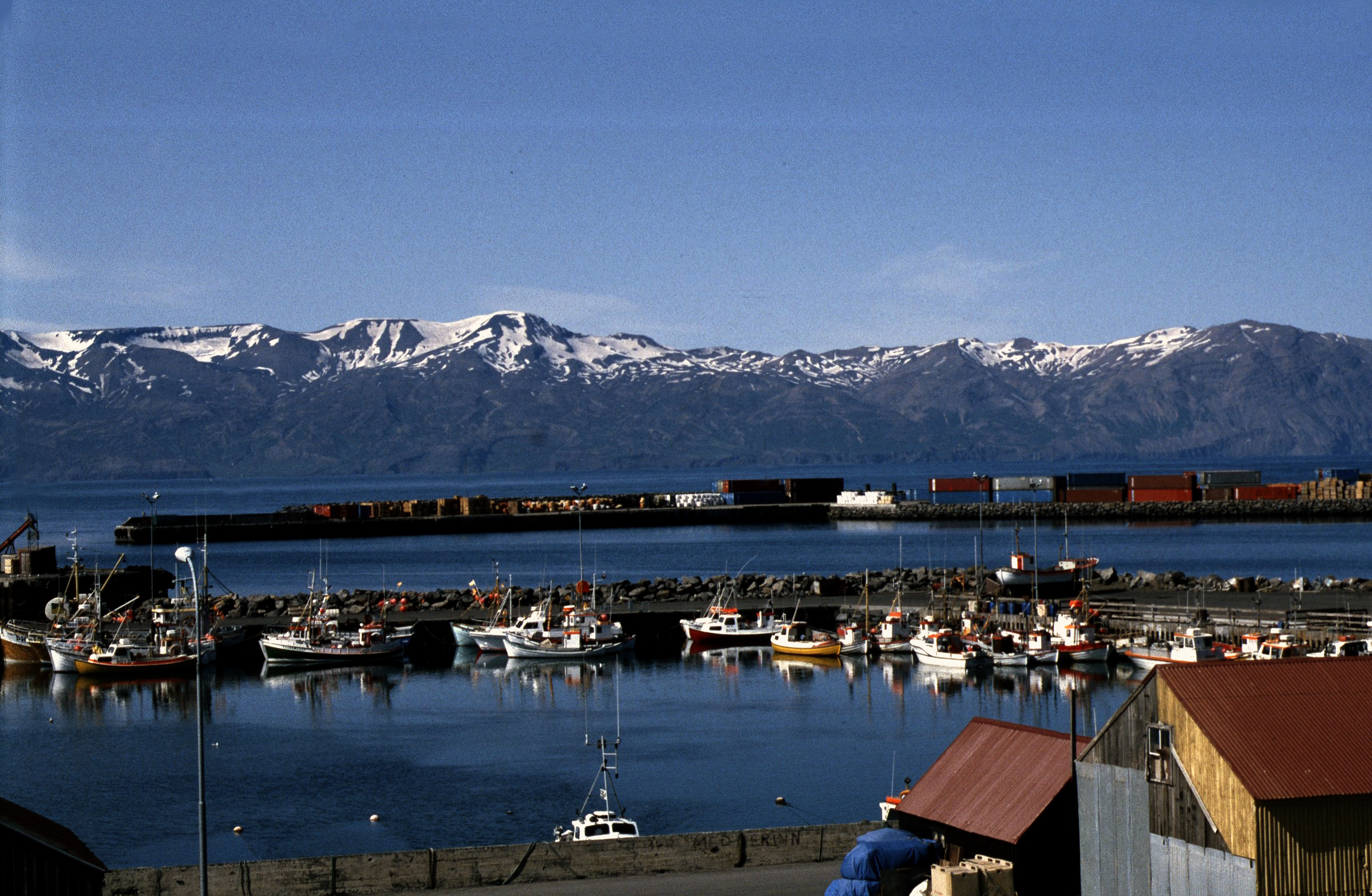 Hafen von Húsavík